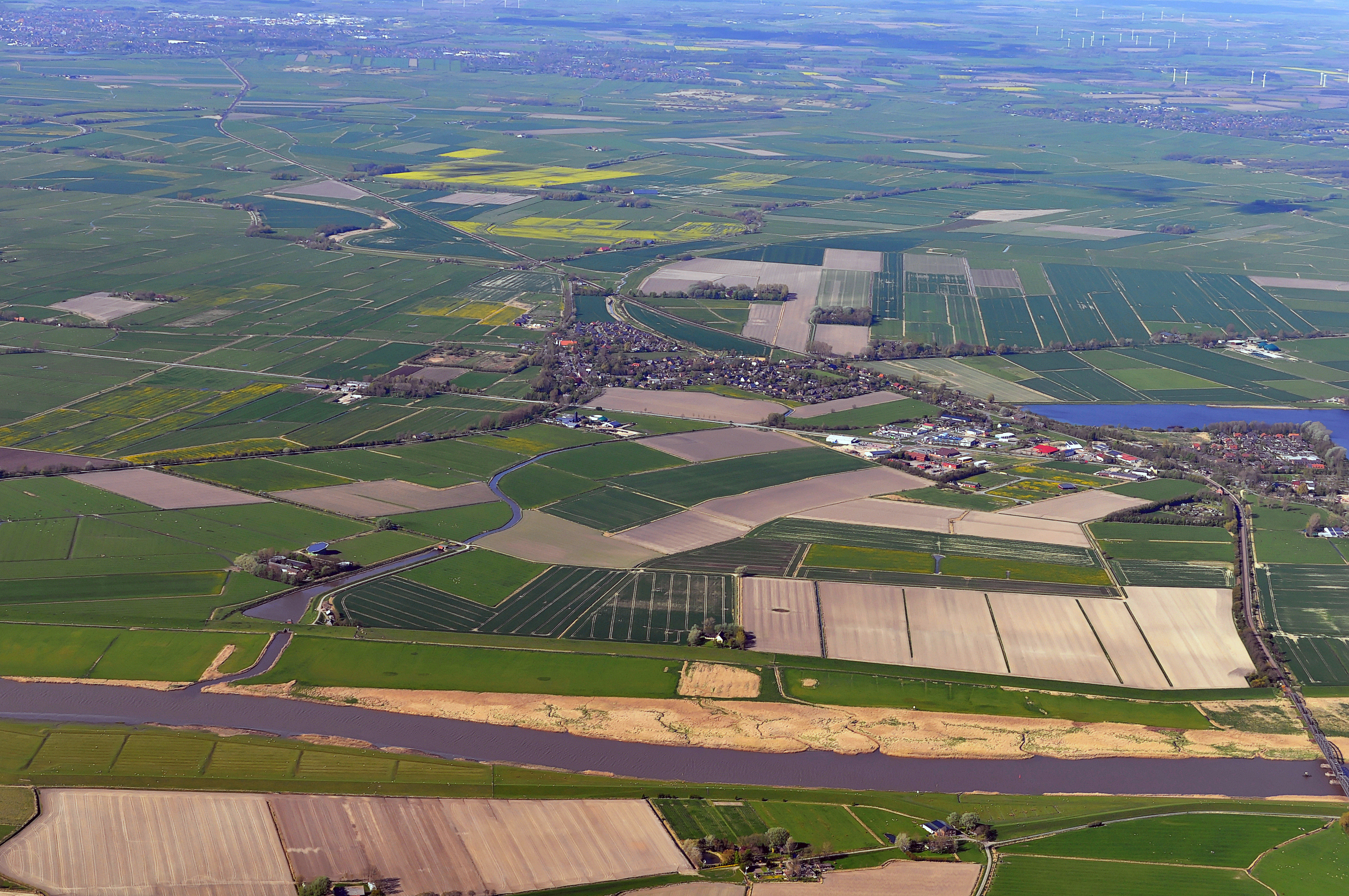 Koldenbüttel und der Westteil von Friedrichstadt am buchtförmigen Ende der durch das Stadtgebiet umgeleiteten Treene (mittlerer Bildteil) an der Marschbahn (mit Eisenbahnbrücke) und Bundesstraße 202 im Bereich des Freesenkoogs. Am unteren Bildrand fließt die Eider in westlicher Richtung. Weiter oben die Südermarsch mit der Stadtsilhouette von Husum und dem Nachbardorf Mildstedt am oberen Bildrand